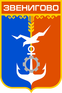 Герб города Звенигово